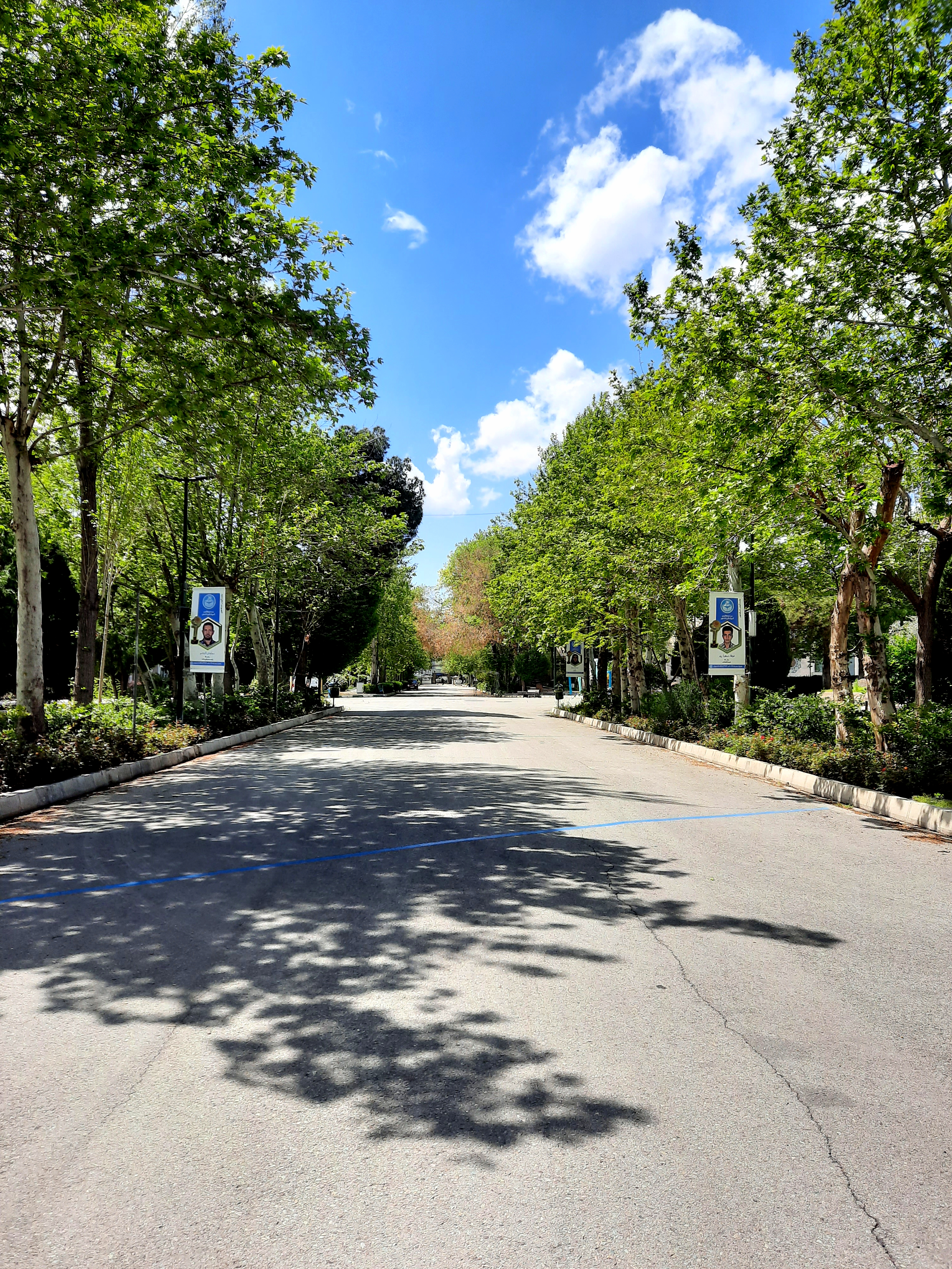 حیاط دانشگاه تهران